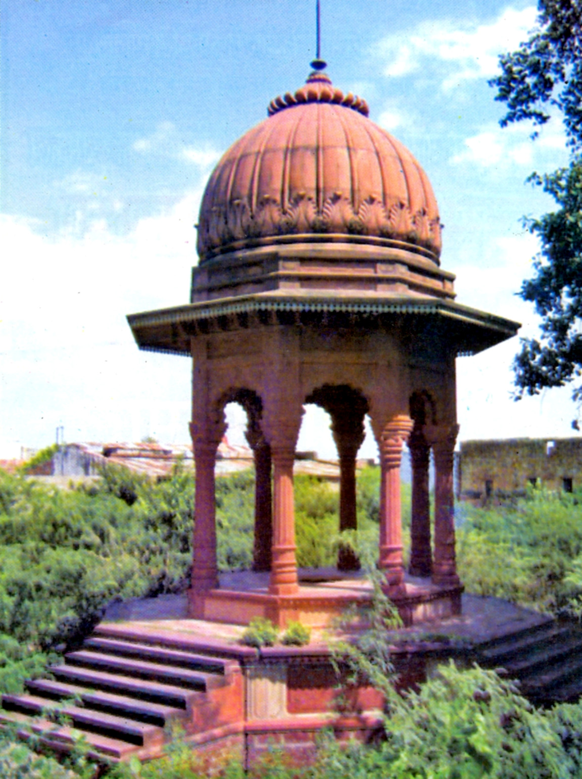 Chhatri of Maharaja Udai Bhan Singh (b. 1893 - d. 1954) of Dholpur, Rajasthan, India